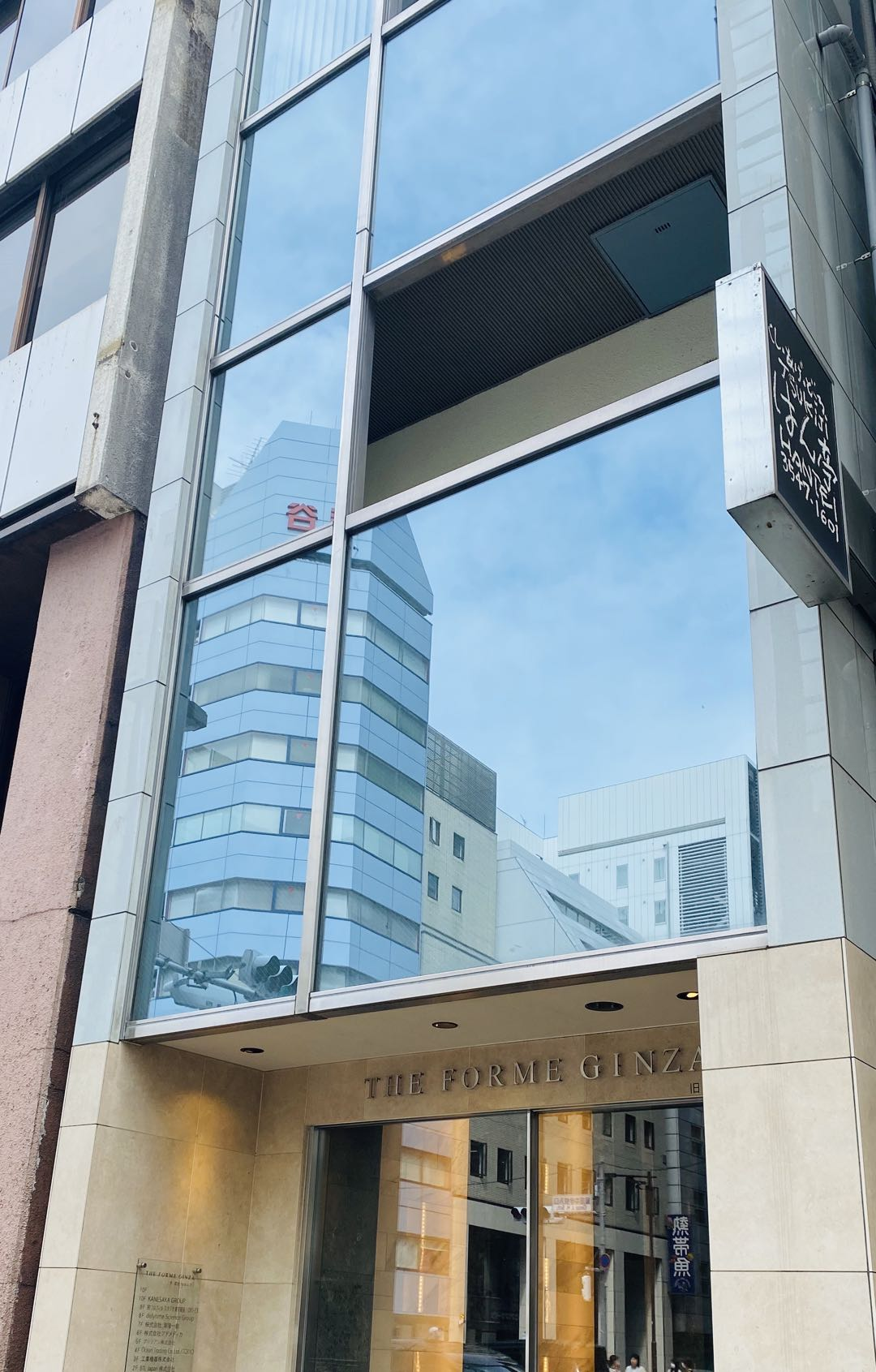 ブリジアン株式会社ビル前に撮った写真です。